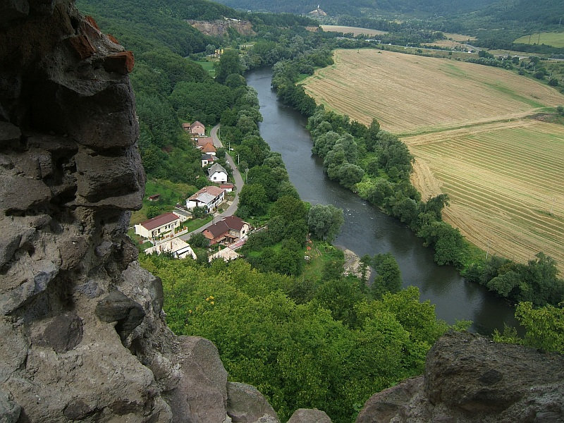 Šášovské podhradie_from window3